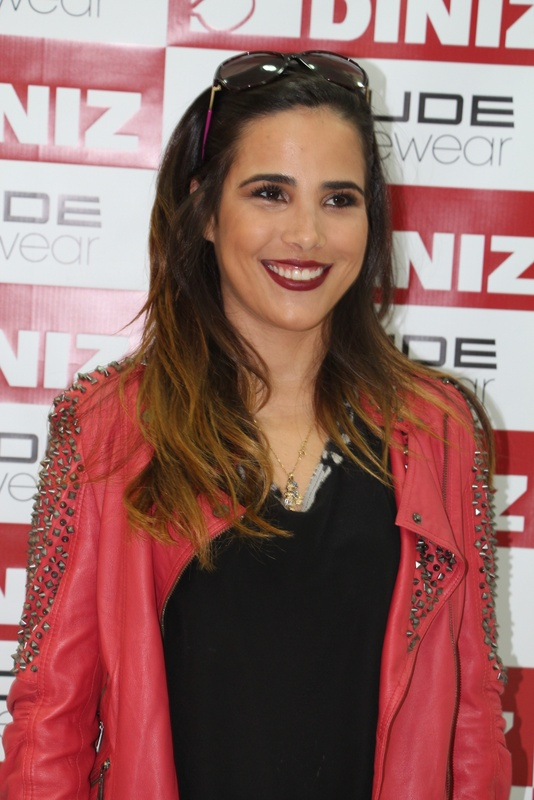 23 - Wanessa-021